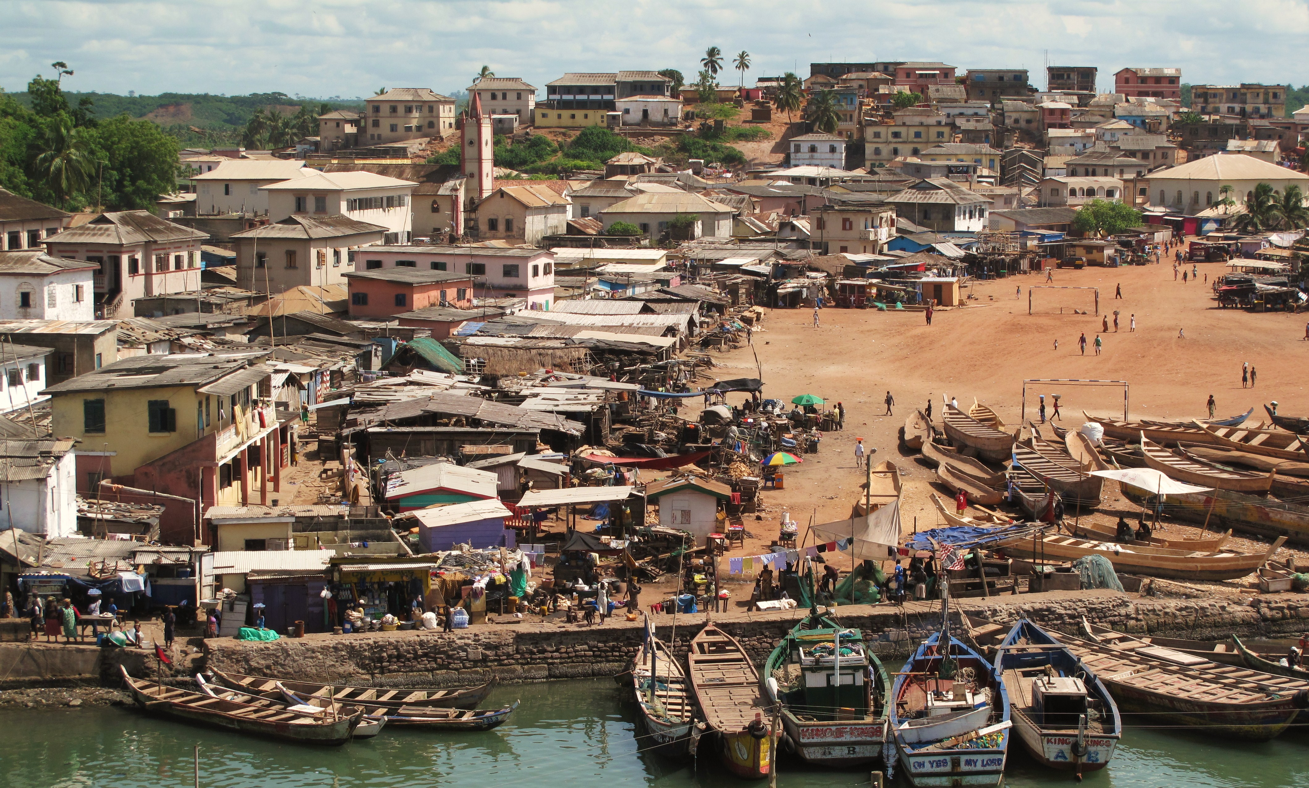 Central Elmina